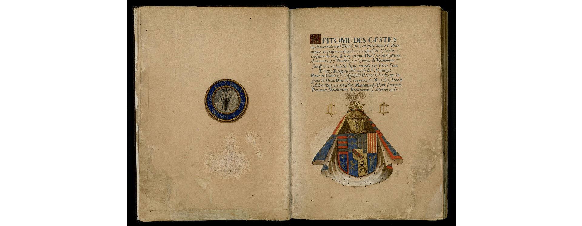 Marque à la fourmi de Jean d'Aucy (1556)